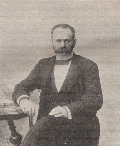 Kresz Géza (1846-1901) portré